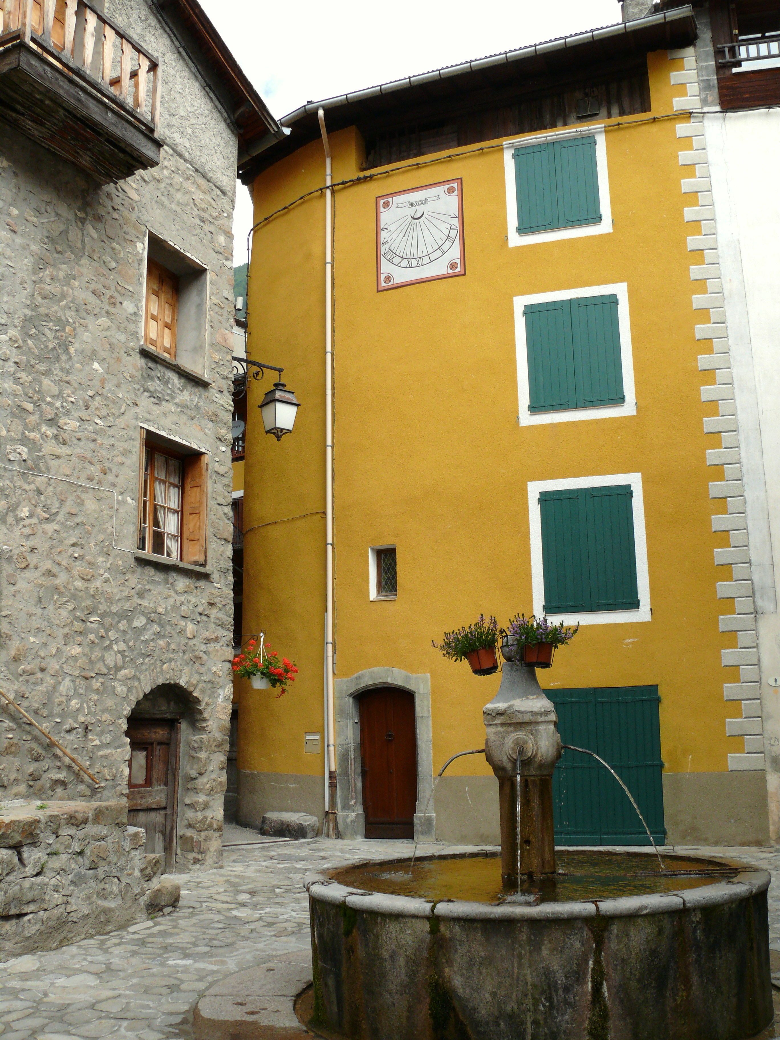 Colmars - La Bugade - La Fontaine Neuve de 1803